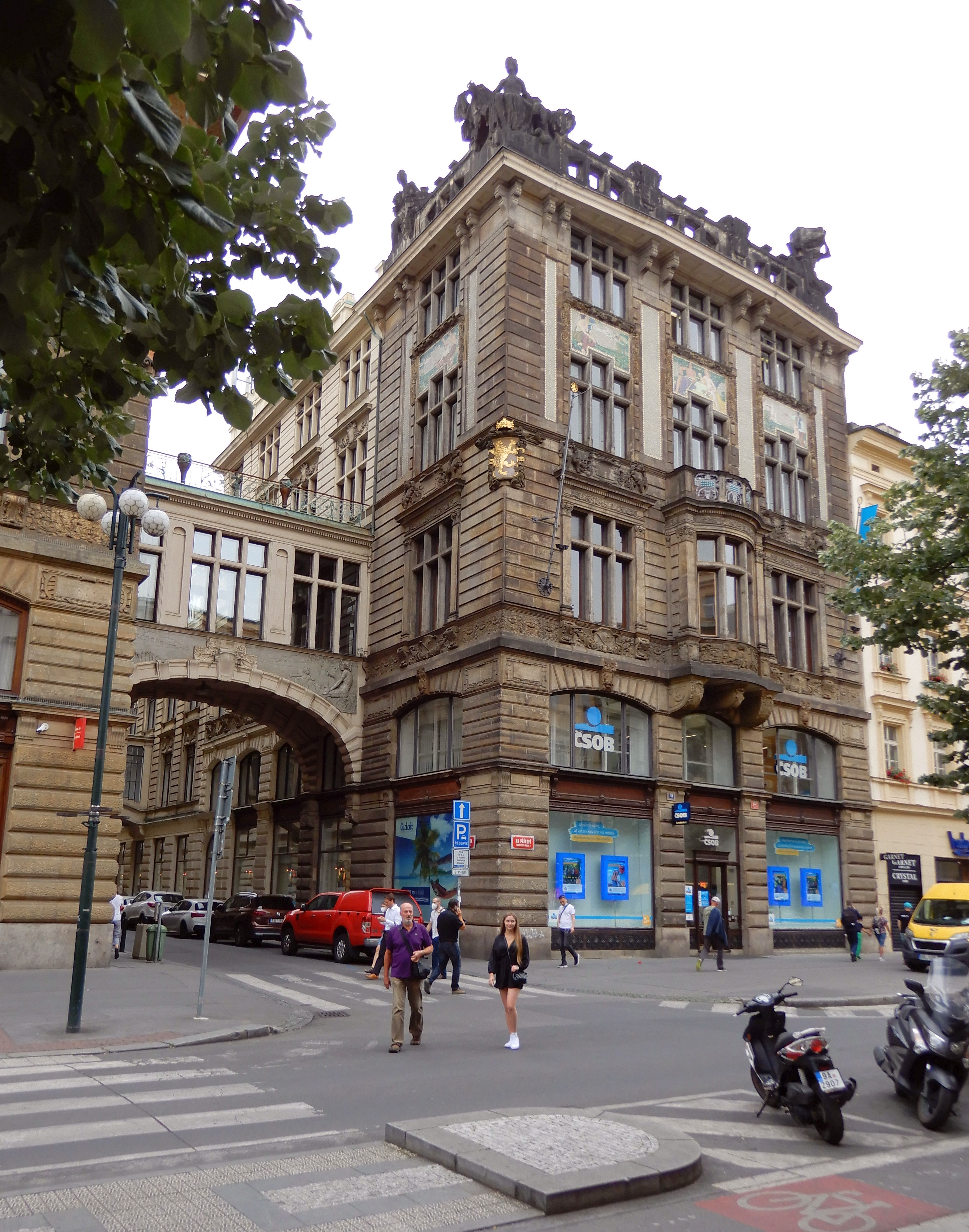 Palác čp.857-II, nároží Na Příkopě 18, roh Nekázanky, architekt Osvald Polívka 1908-1910